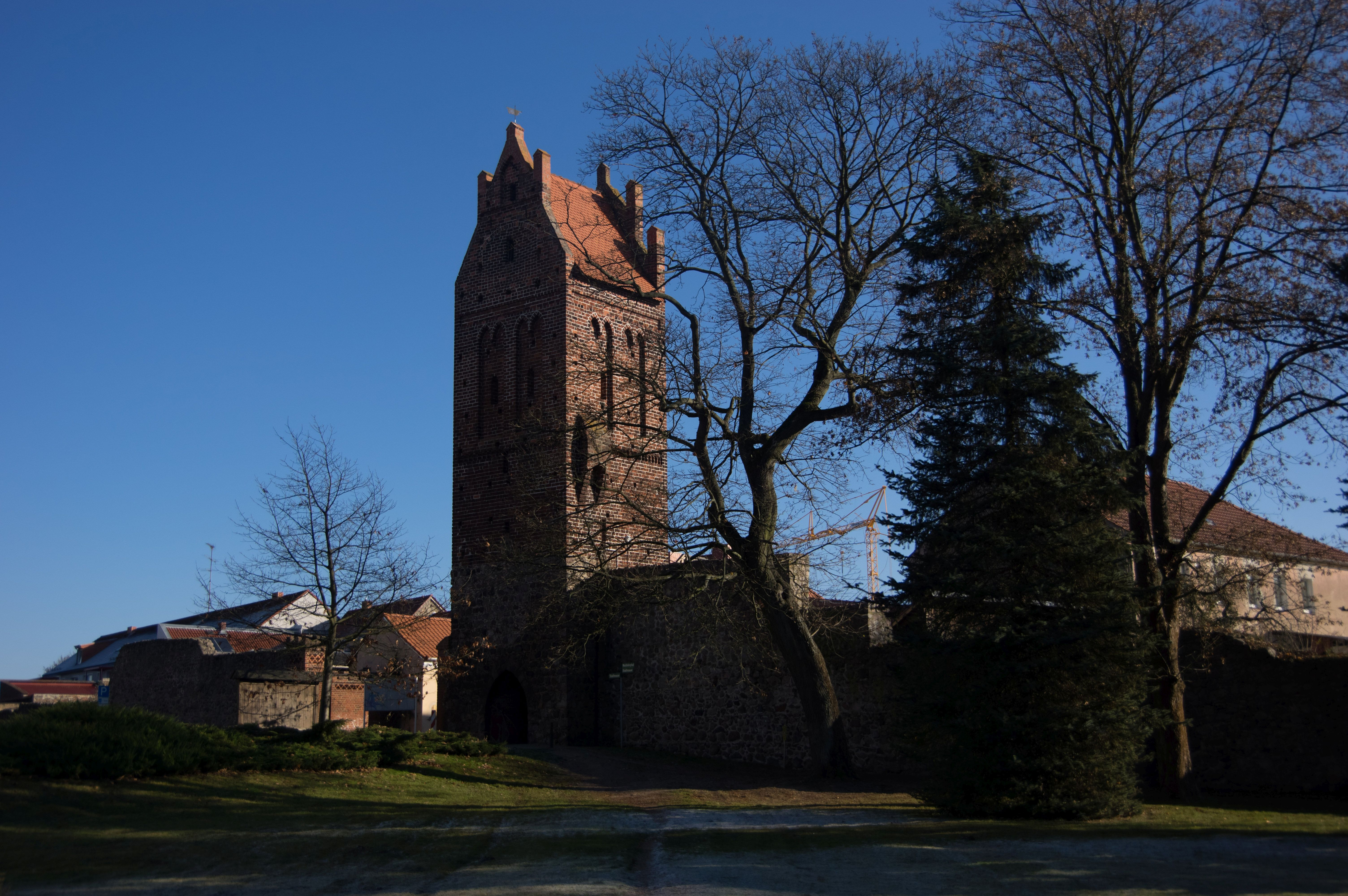 Müncheberg in Brandenburg. Das Berliner Tor ist Teil der Stadtmauer und steht unter Denkmalschutz.